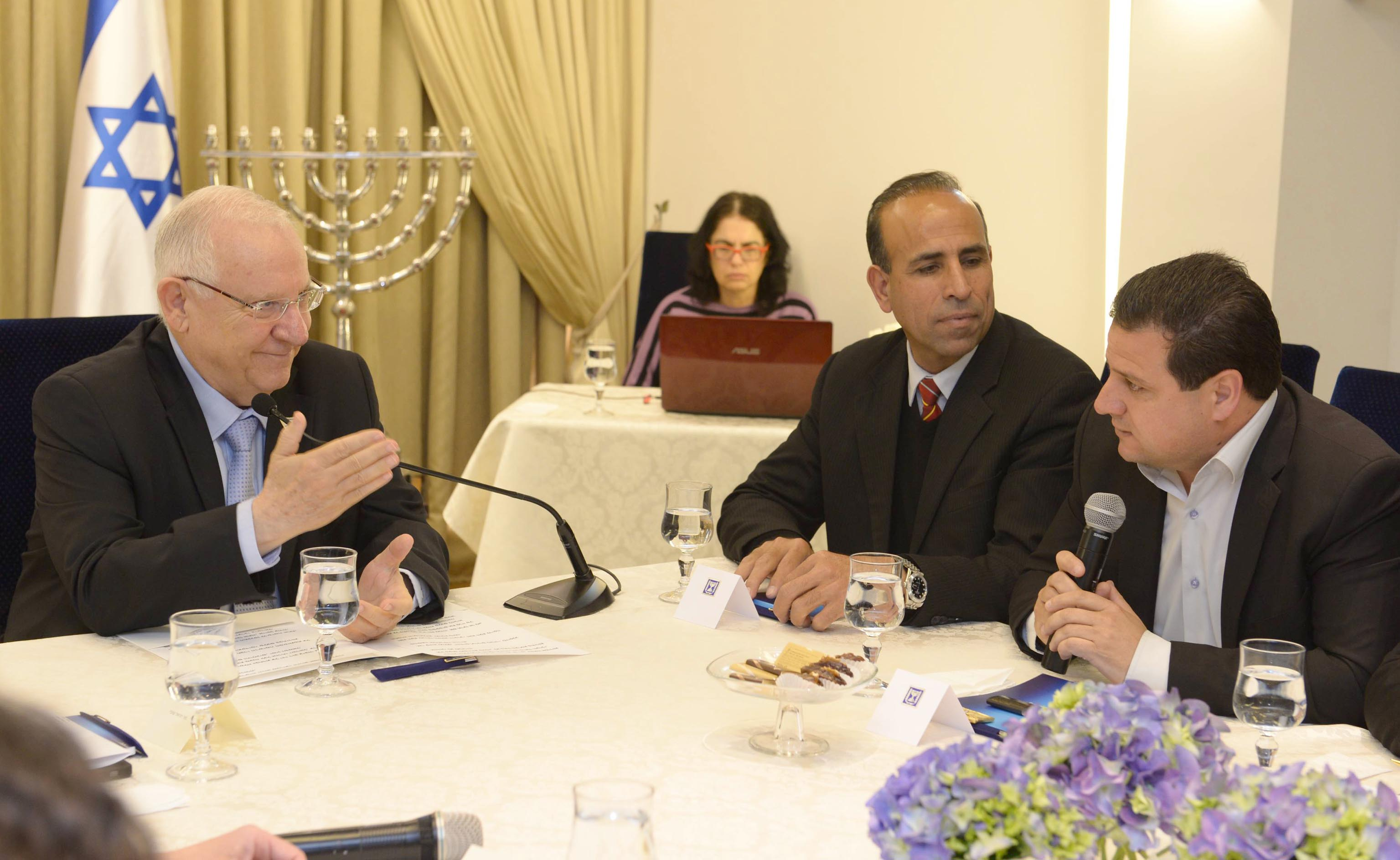 נשיא מדינת ישראל ראובן ריבלין פותח בהתייעצויות עם המפלגות השונות לקראת הרכבת הממשלה לאחר בחירות מרץ 2015 עם הרשימה המשותפת